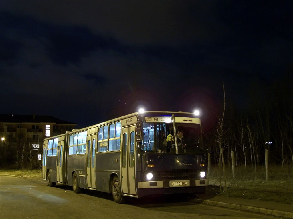 14É jelzésű éjszakai járat